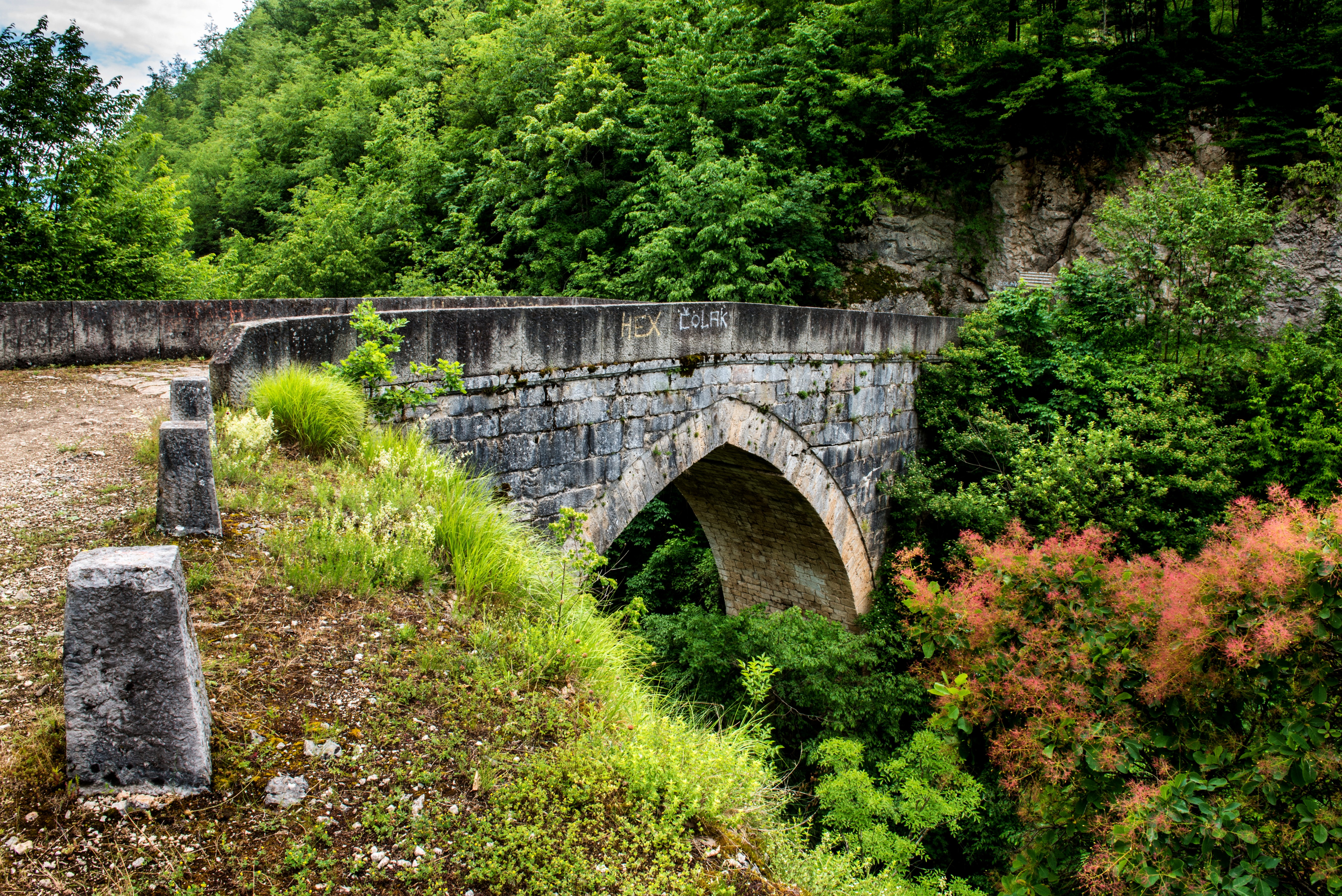 This image was uploaded as part of Trace of Soul 2016.